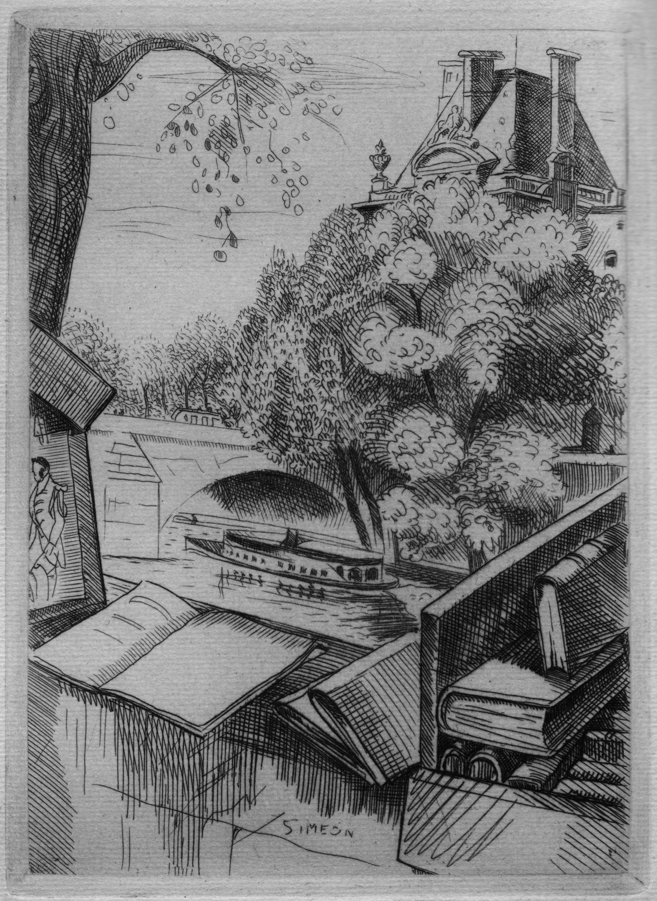 Illustration sur bois du "Crime de Sylvestre Bonnard" d'Anatole France - frontispice - Édition Mornay - 1923